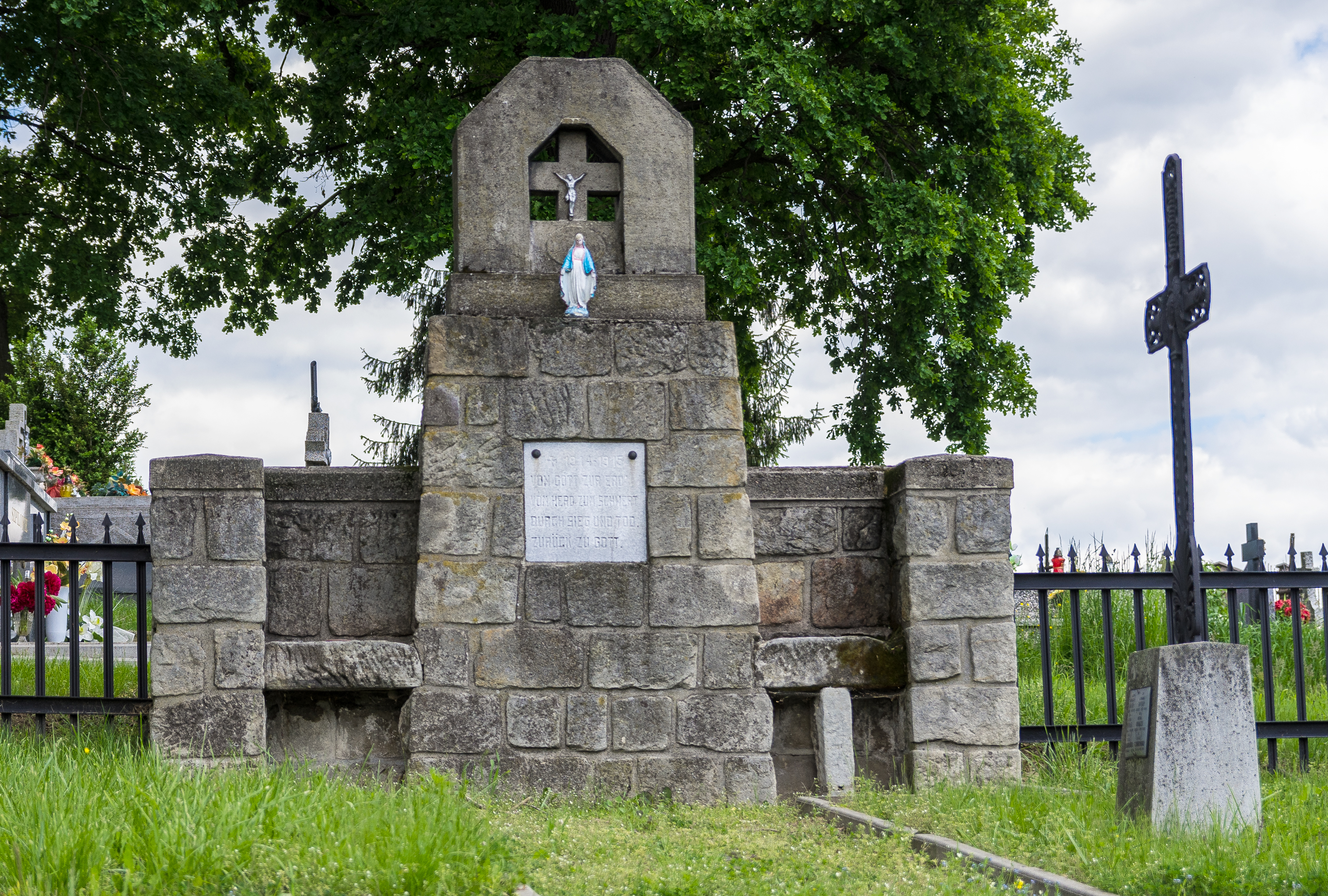 Domosławice